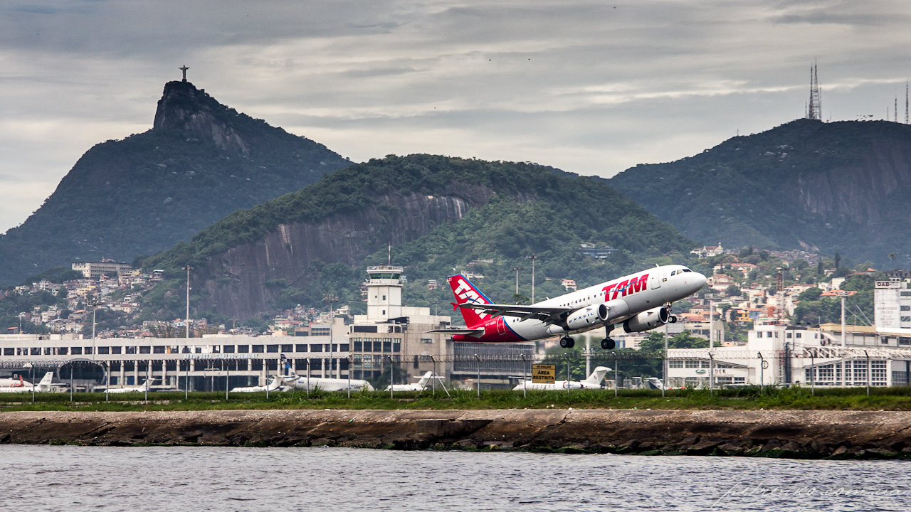 R. Do Rancho - Centro, Rio de Janeiro - RJ, Brazil